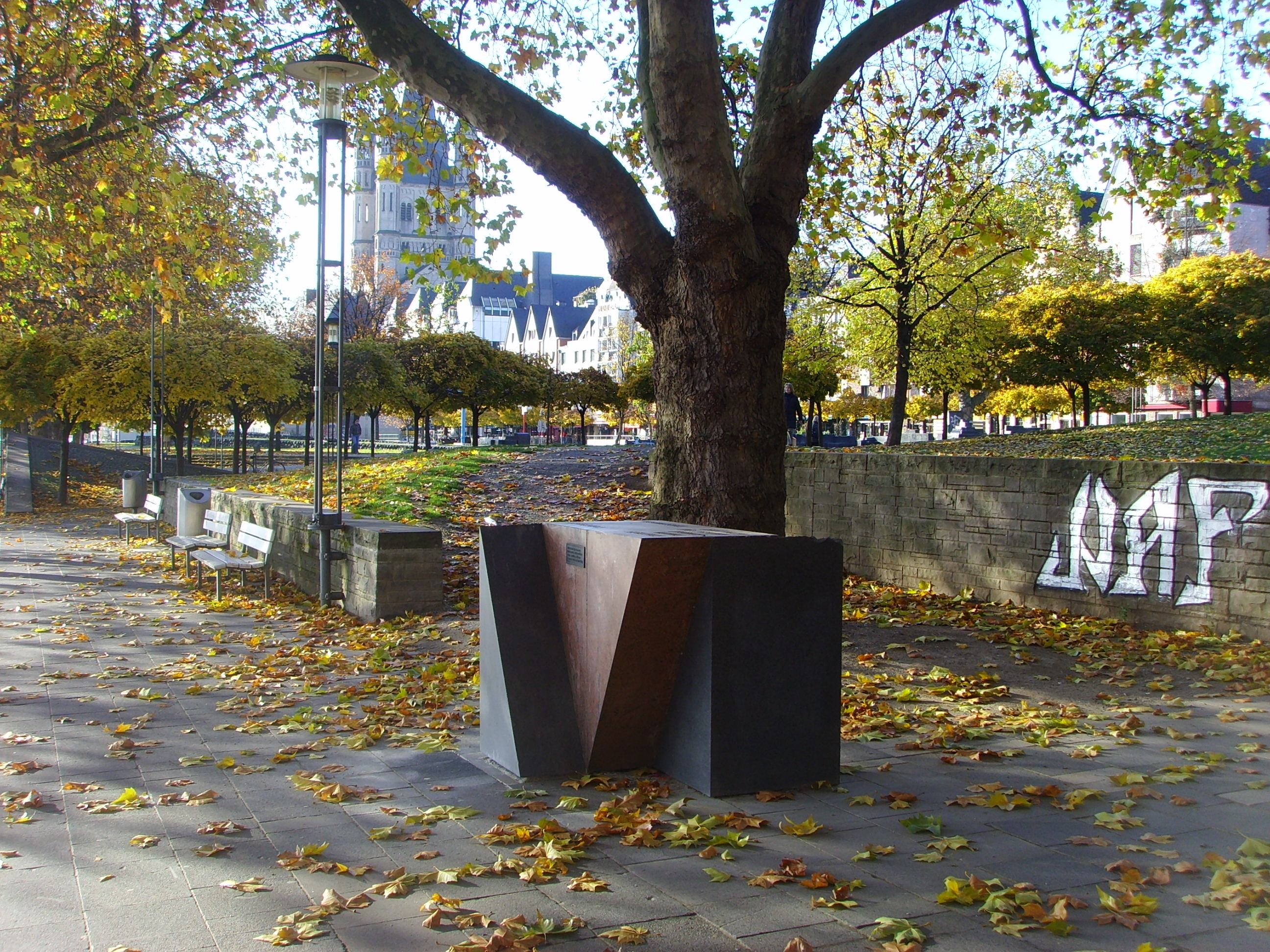 Standort des Mahnmals im Rheingarten vor der Altstadt Kölns